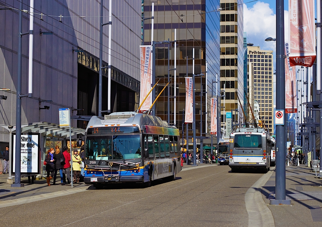 A TransLink Trolley Bus in Vancouver Downtown, 2012